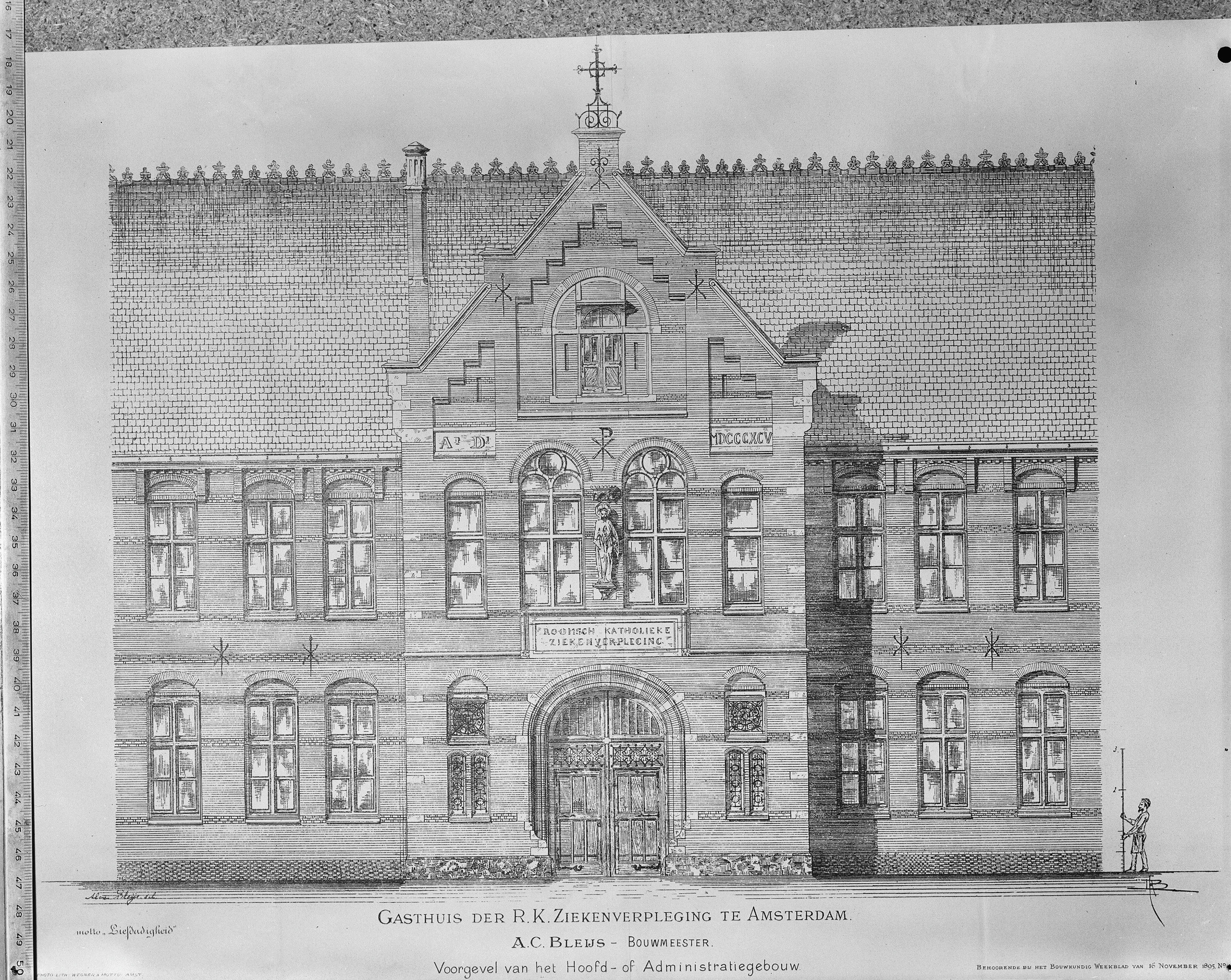 R.K. Ziekenhuis naar Bouwkundig Weekblad 1895, ingangspartij tekening gemeentearchief Amsterdam.